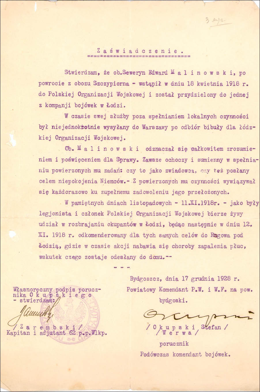 Seweryn_Malinowski_-_zasswiadczenie_POW